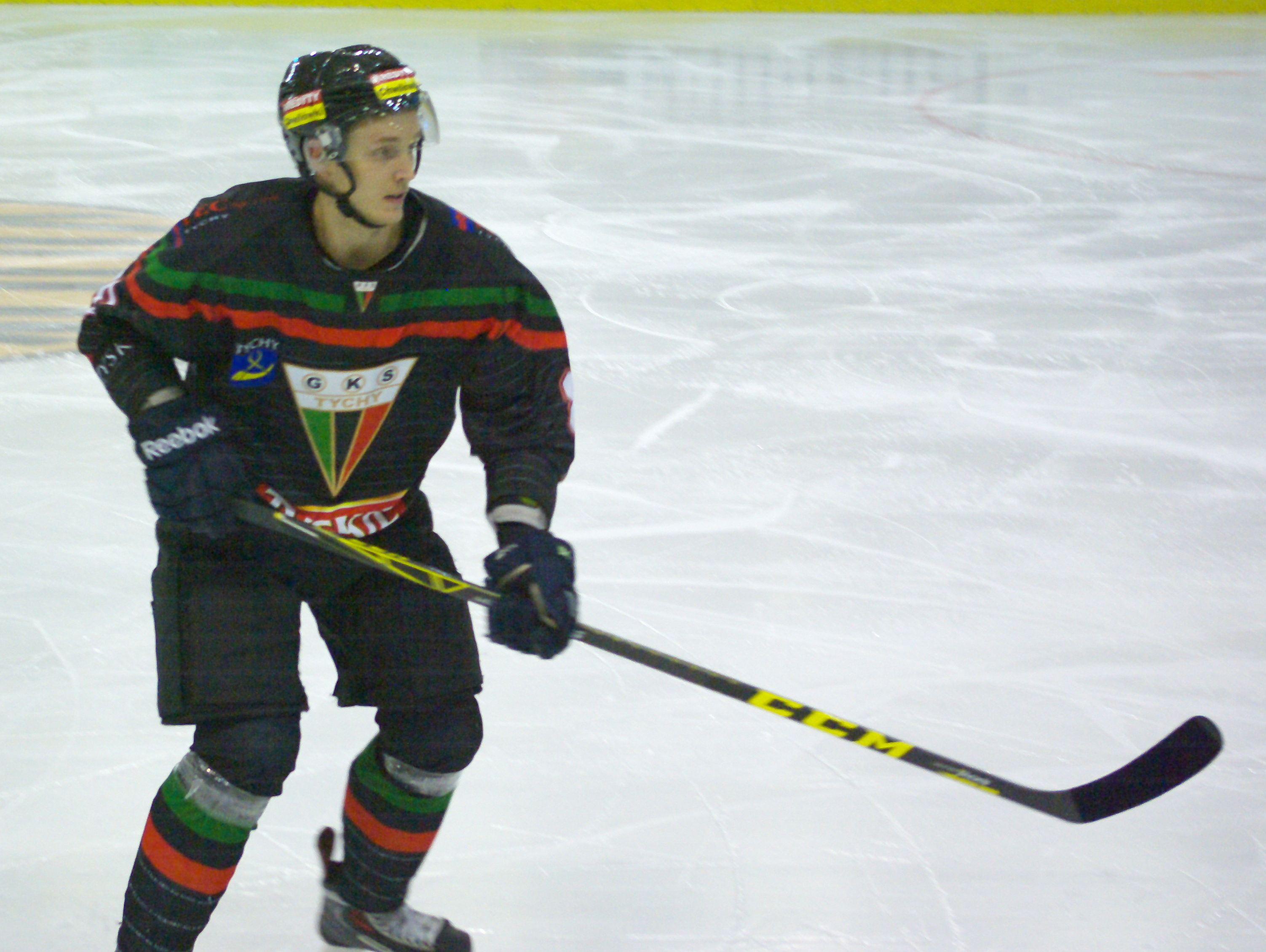 Marcin Kolusz w barwach GKS Tychy w meczu przeciw STS Sanok (Arena Sanok, 22 grudnia 2015)